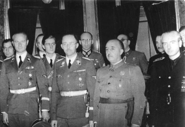 Empfang des Reichsfühers SS Himmler beim Caudillo Während seines Aufenthaltes in Spanien, der im Zeichen der deutsch-spanischen Freundschaft stand, empfing auch der Staatschef Franco den deutschen Gast. UBz: Reichsführer SS Himmler während des Empfangs bei dem Generalissimus Franco. Ganz rechts der spanische Aussenminister Serrano Suner, hinter dem Caudillo (halb verdeckt) General Moscardo. Herausgabe 25.10.1940